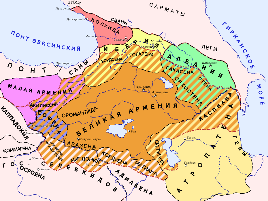 Государства Закавказья II-I вв. до н.э., "Всемирная история", т.2, 1956 г.